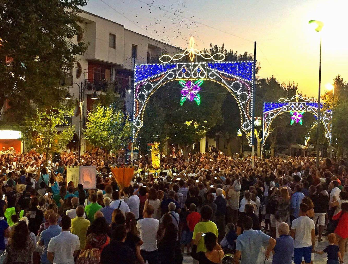 Accoglienza della Madonna del Carmine ad Accadia il 21 agosto 2016